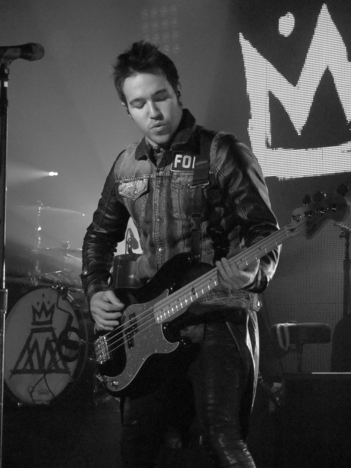 Pete Wentz live in 2013.